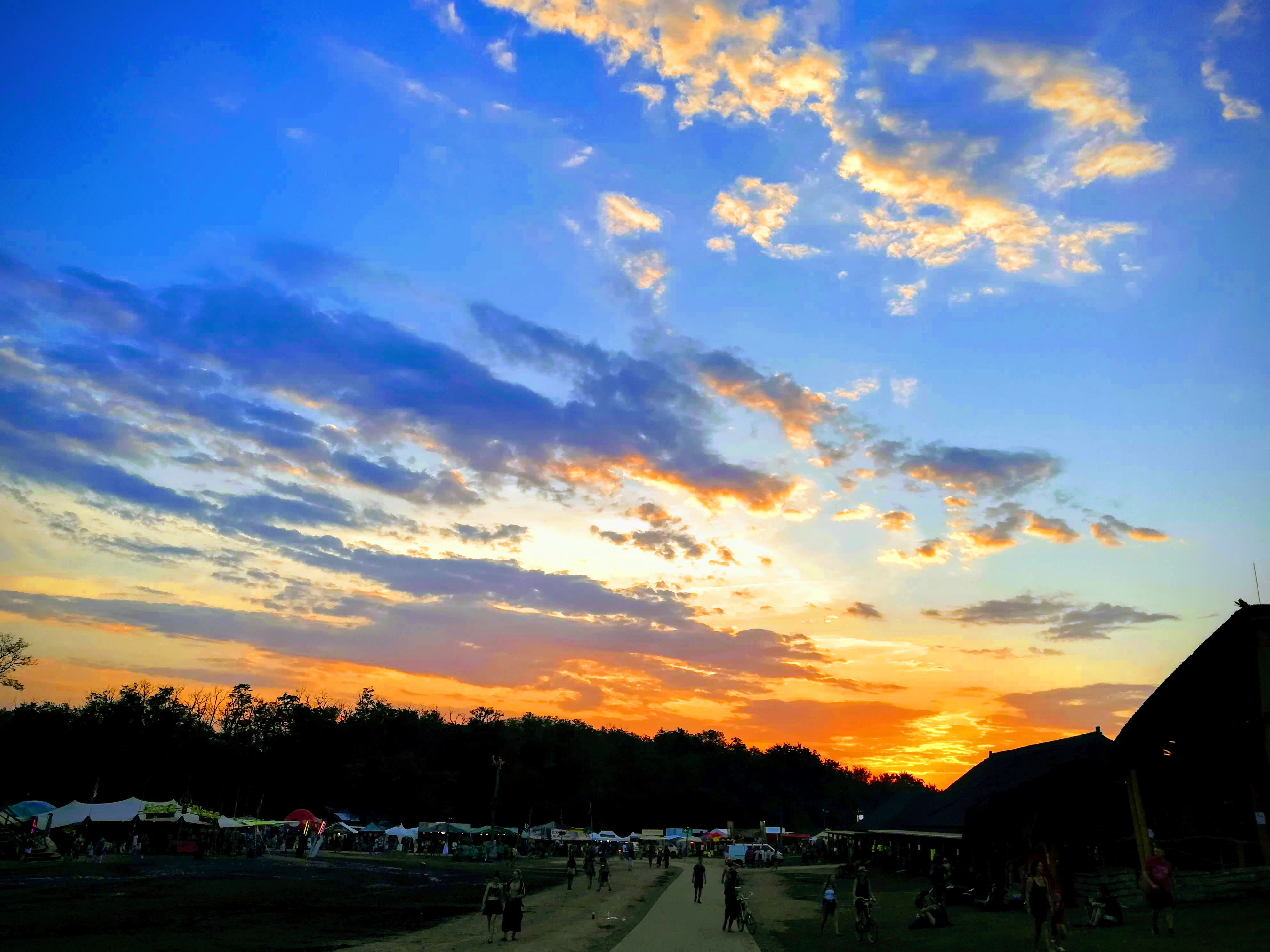 Dobrodošli na Ozoru